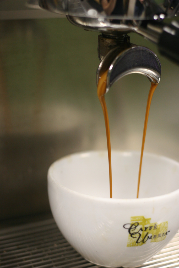 Mal fehen of if Rehe in Kekfform find. ;).